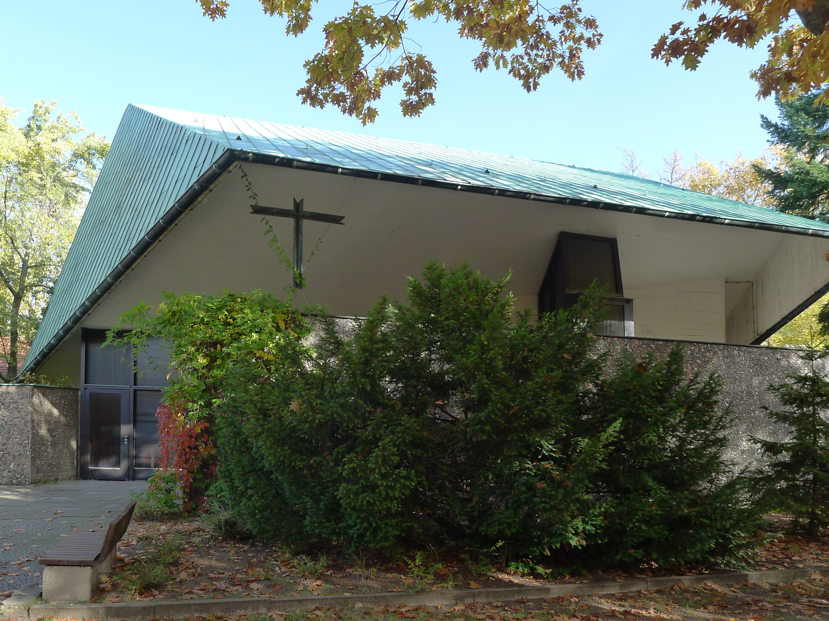 Südseite der Kirche mit der von Sträuchern verdeckten Waschbetonmauer